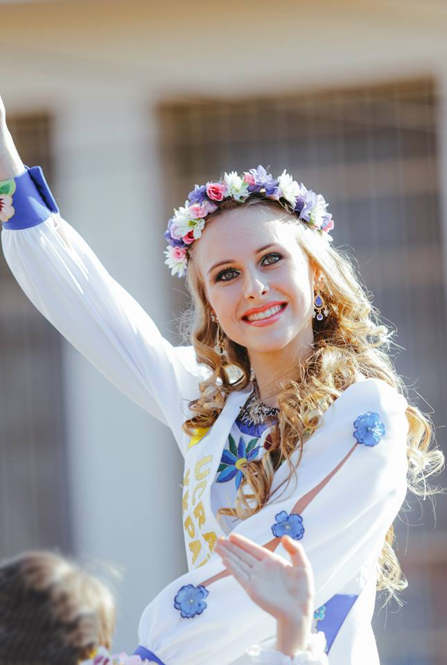 Daiana Paola Sawczuk, actual Reina Nacional del Inmigrante